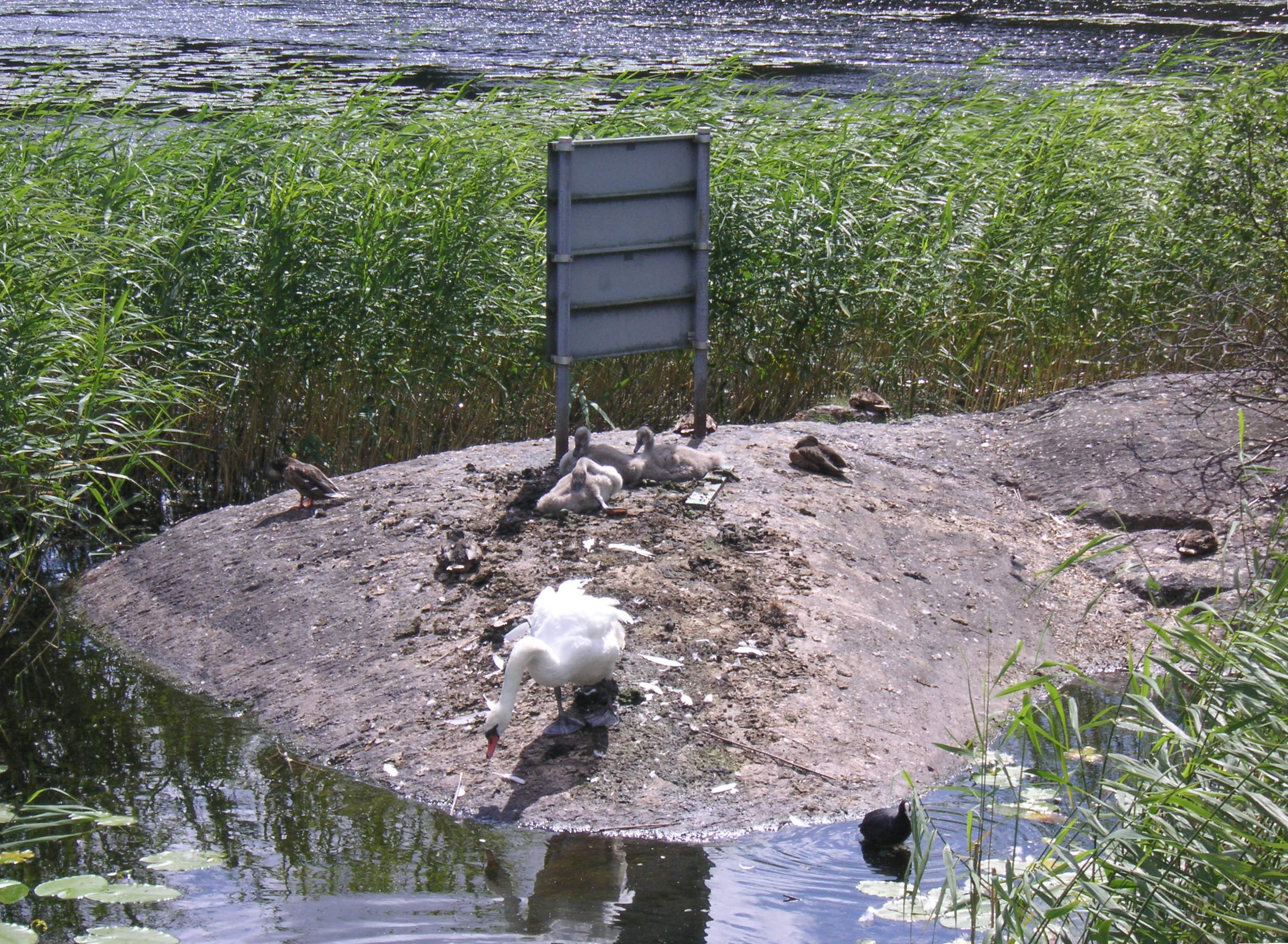 Svanbo i Magelungen